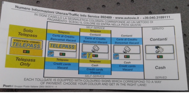 retro di un biglietto autostradale